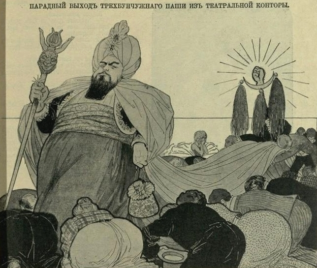 Коллежский советник Крупенский (обращаясь к артистам): — Чего моя левая нога хочет?